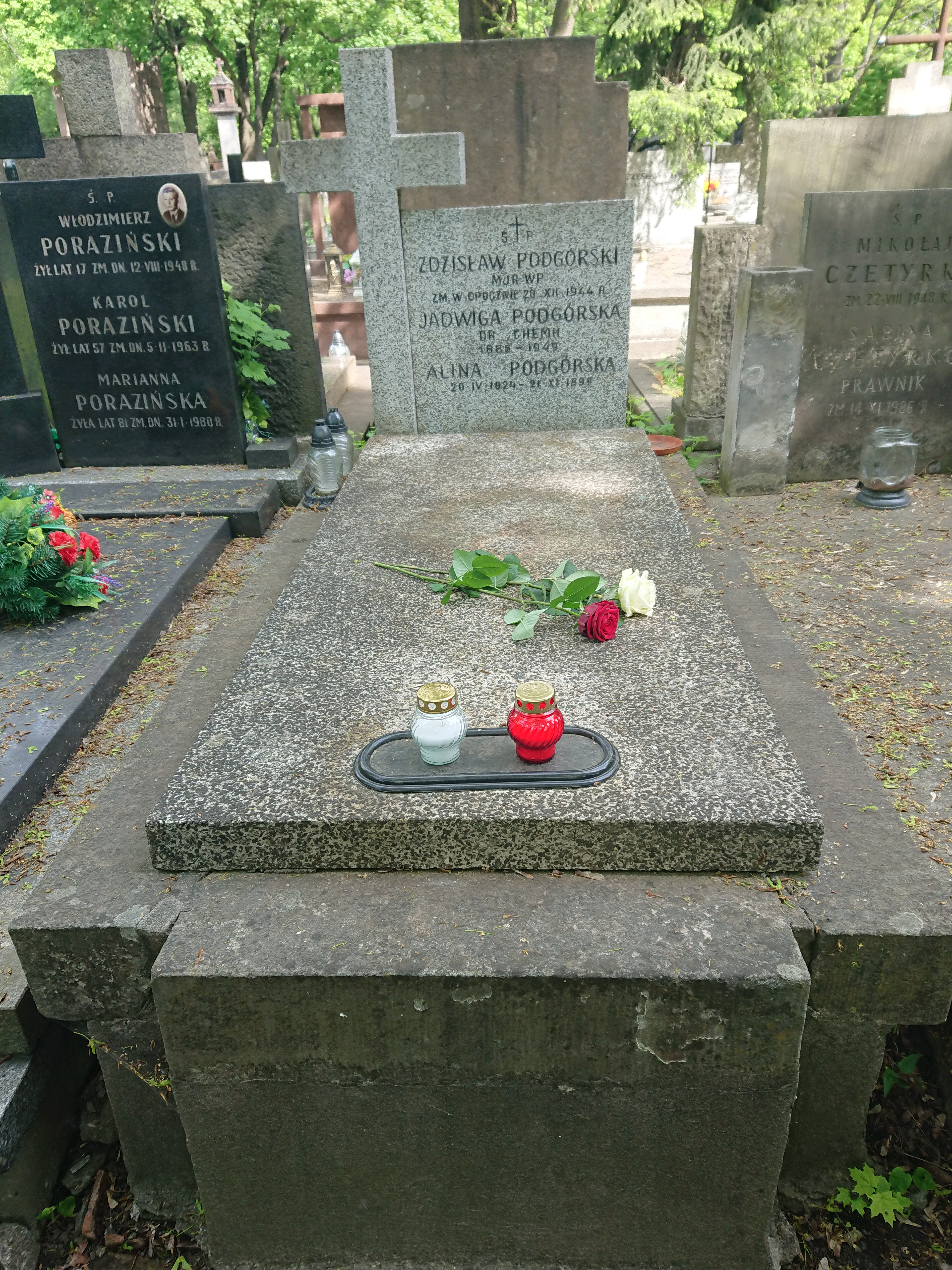 Grób Zdzisława i jego siostry Jadwigi Podgórskich (oraz córki Zdzisława – Aliny) na starych Powązkach, kwatera 241-IV-11